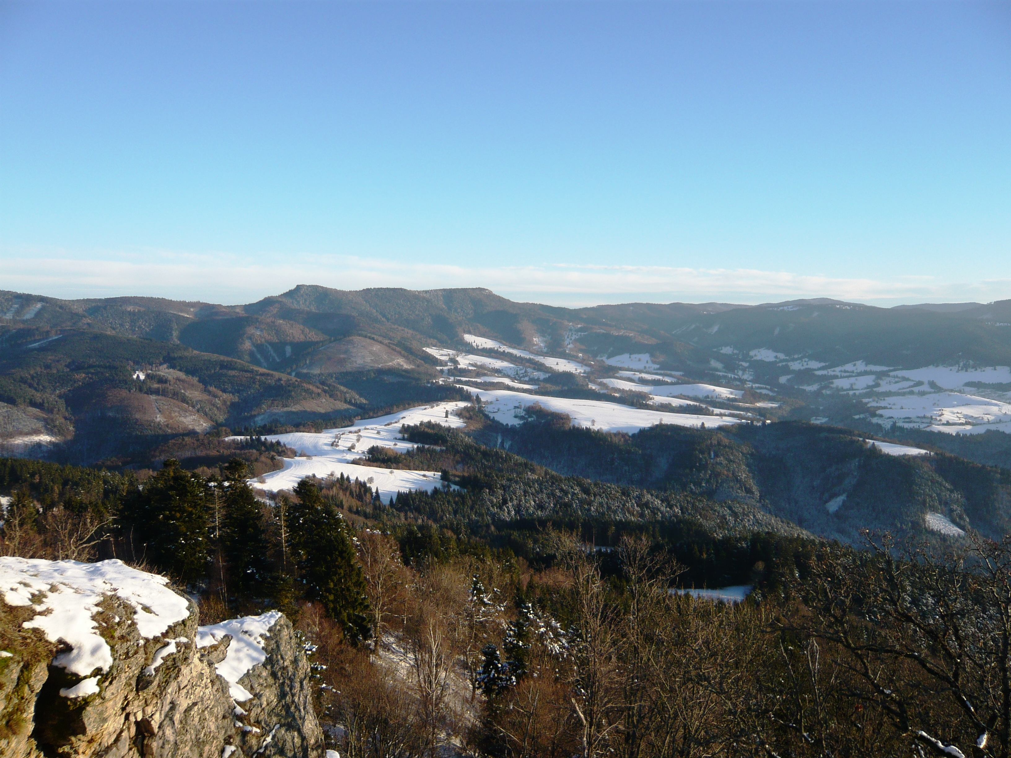 Obec Strelníky leží na úpätí Poľany